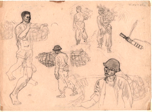 "Cuộc di tản"